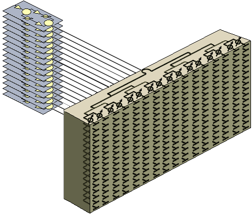 Planares Array einer Phased Array Antenne, jeder Einzelstrahler verfügt über einen eigenen Phasenschieber. Das Diagramm kann sowohl horizontal, als auch vertikal geschwenkt werden.